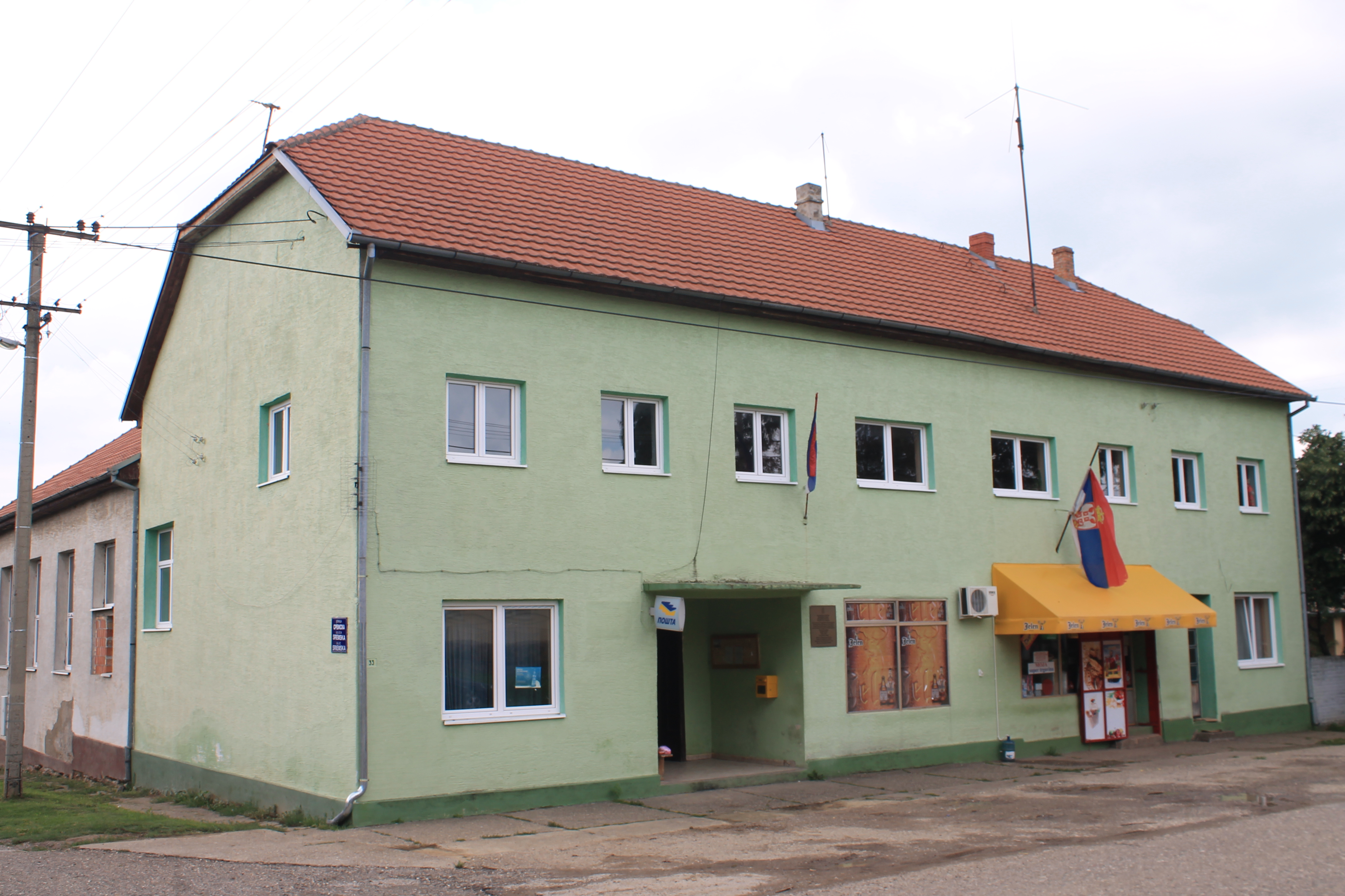 Selo Ljuba